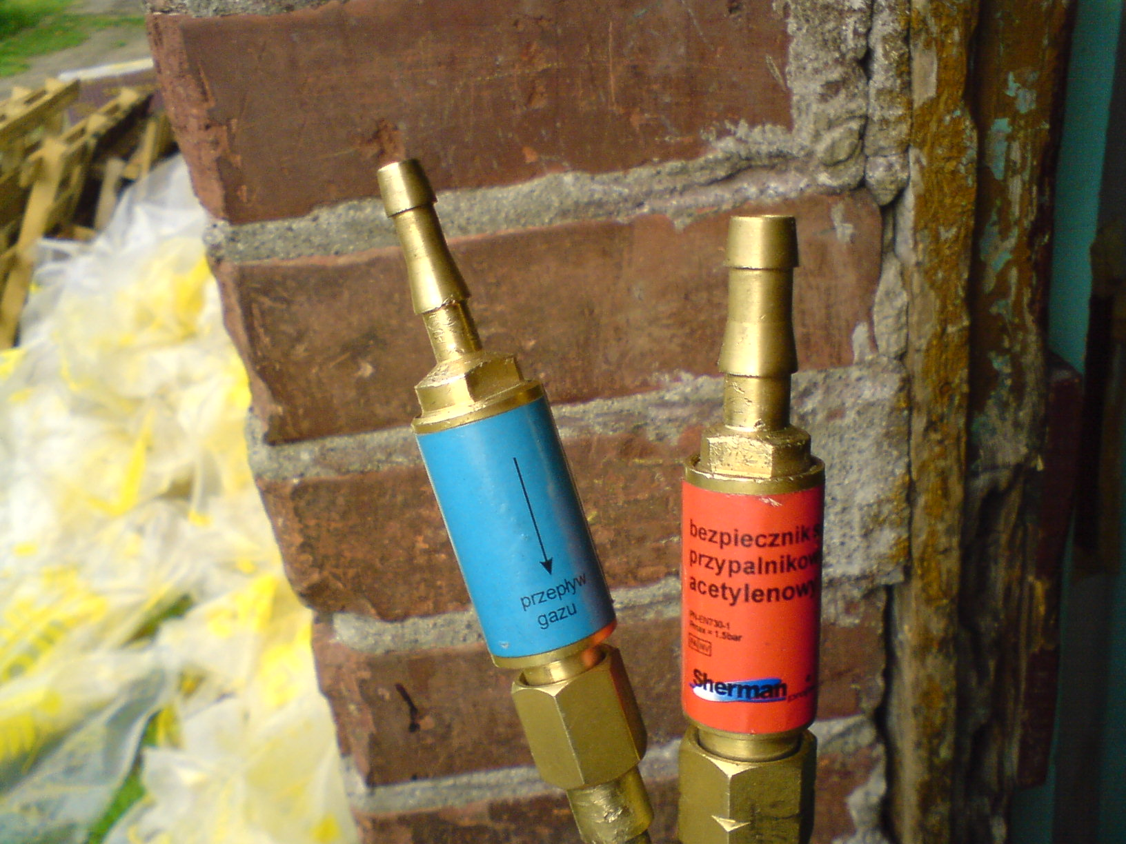 Bezpieczniki suche przypalnikowe